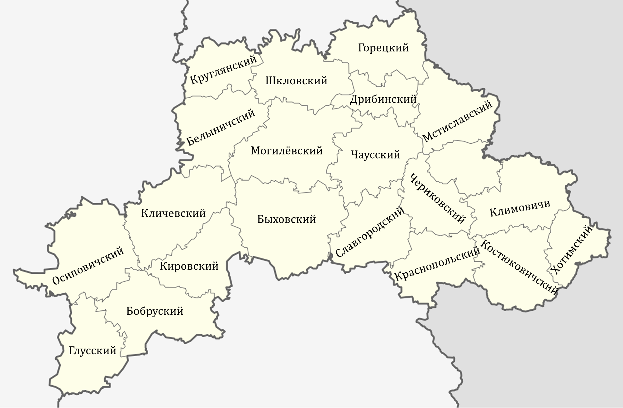 Административно-территориальное деление Могилёвской области